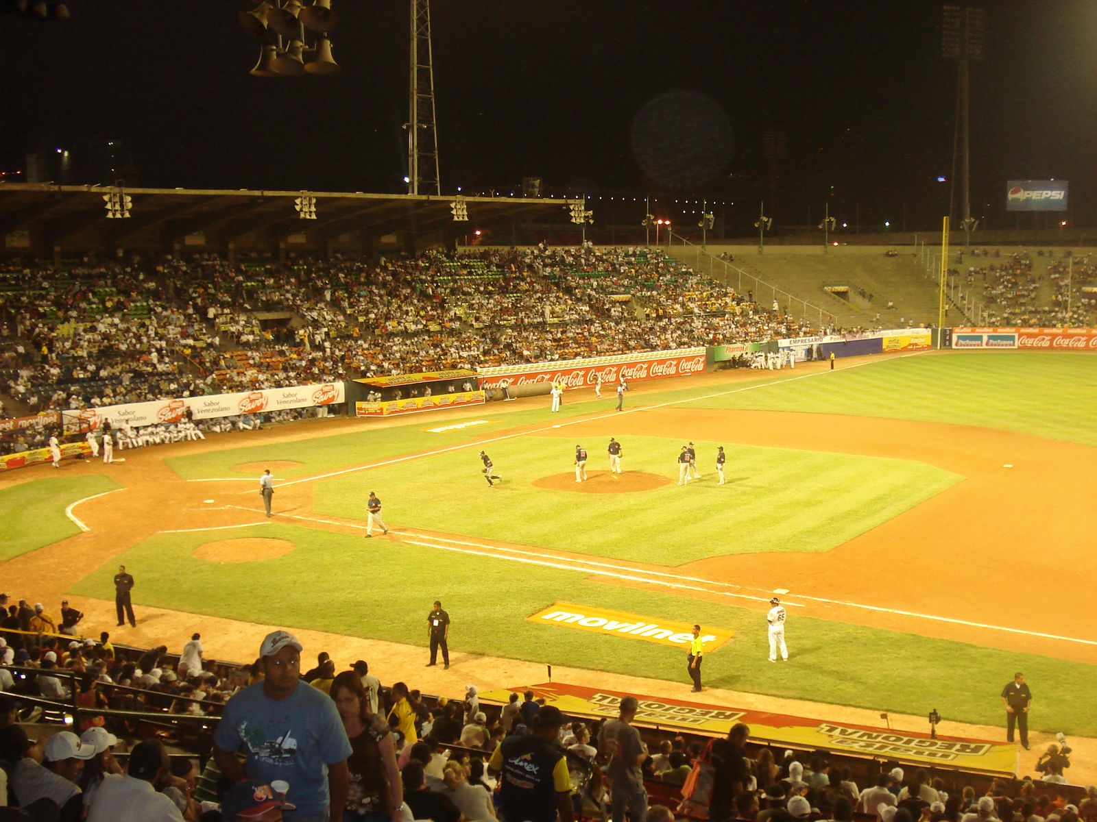 estadio de beisbol de la ucv, caracas